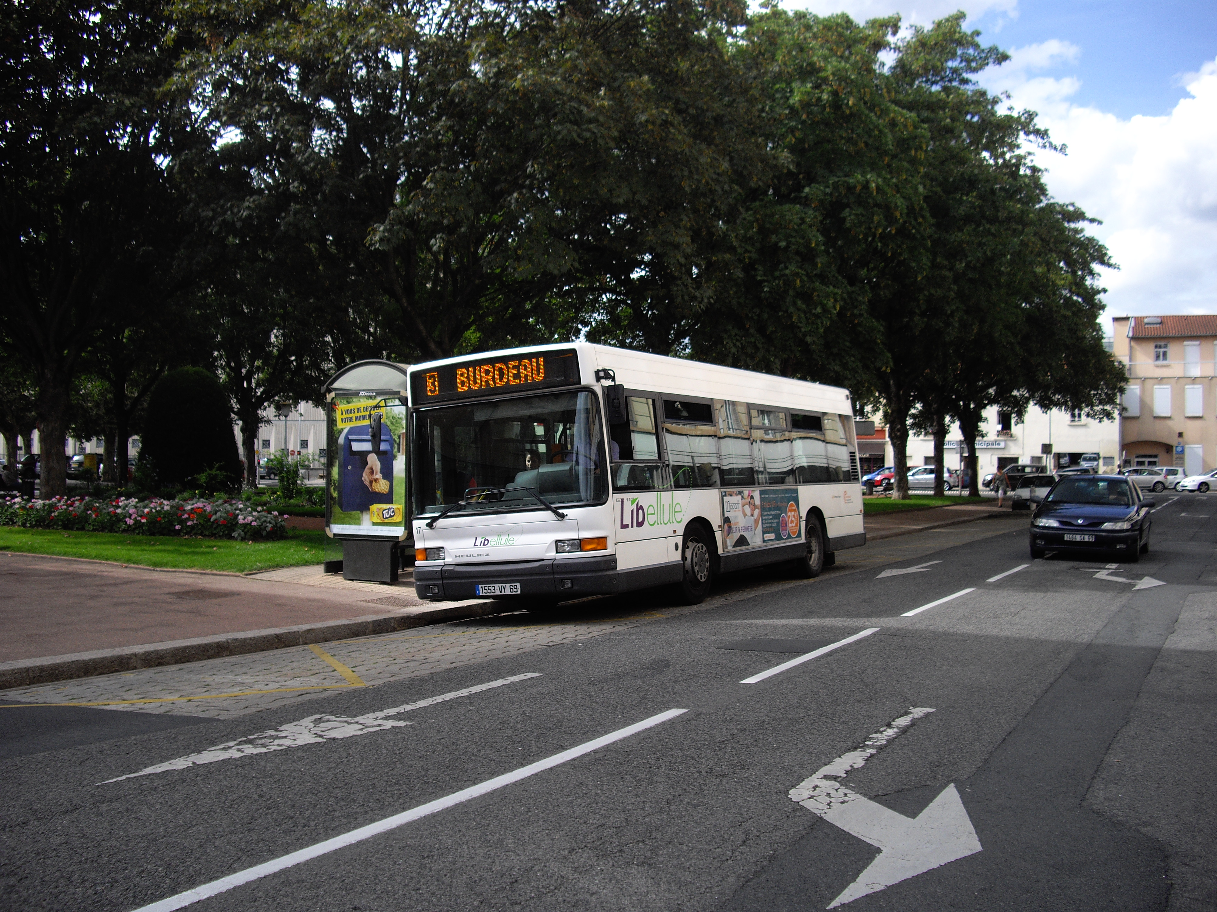 Heuliez GX117 - Villefranche-sur-Saône - Réseau Libellule